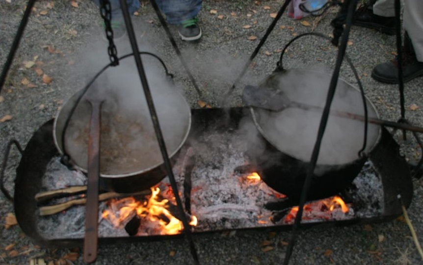 Pripremanje gulasa